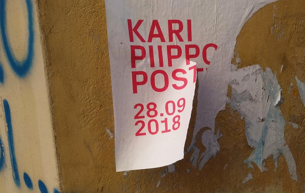 KARI PIIPPO: manifesto a Torino in via Bonelli angolo via Bellezia